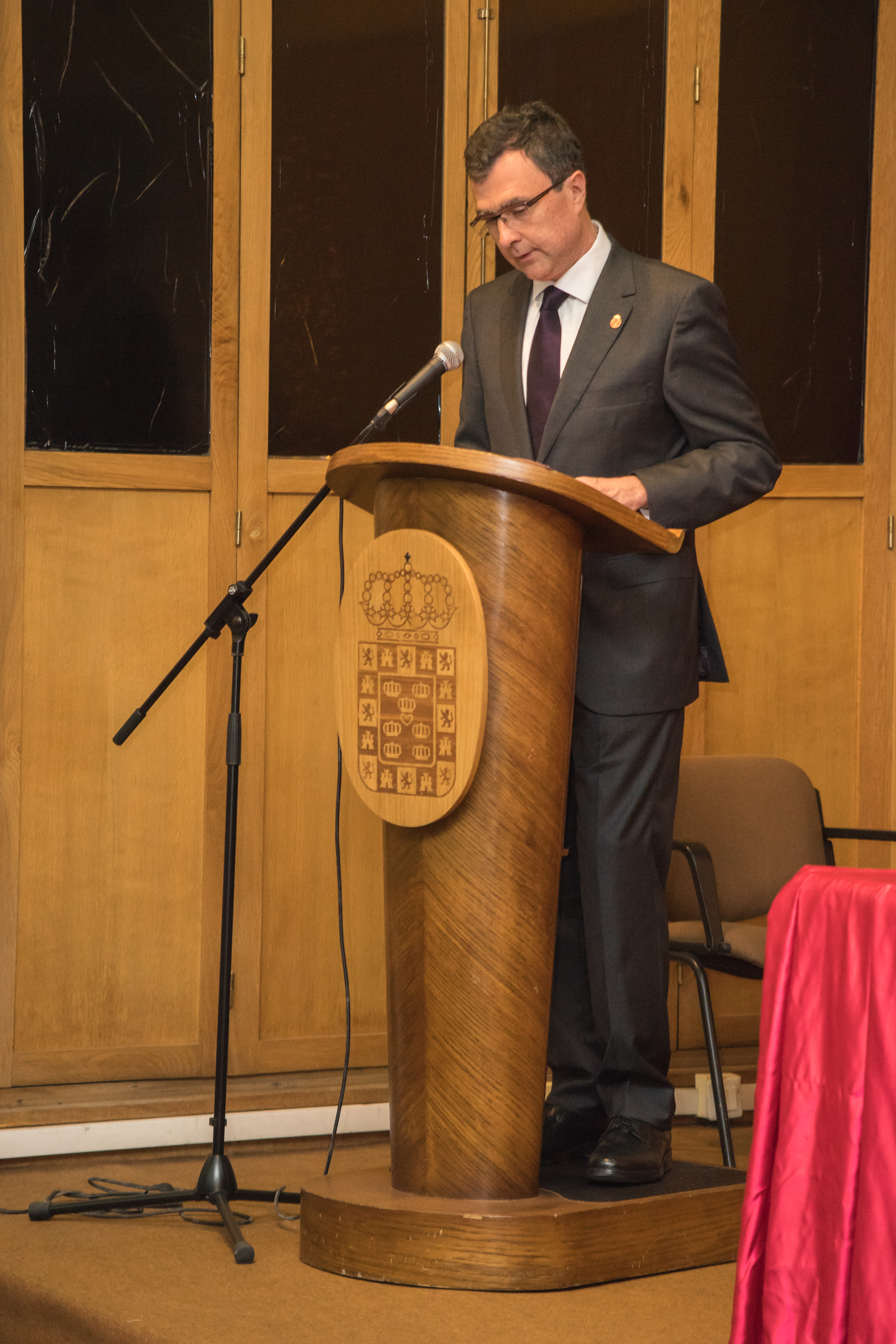 Ex Rector de la Universidad de Murca (1998-2006) Ex Consejero de Obras Públicas, Vivienda y Transportes en la Séptima Legislatura del Consejo de Gobierno de la Región de Murcia y candidato a la Alcaldía de la ciudad de Murcia